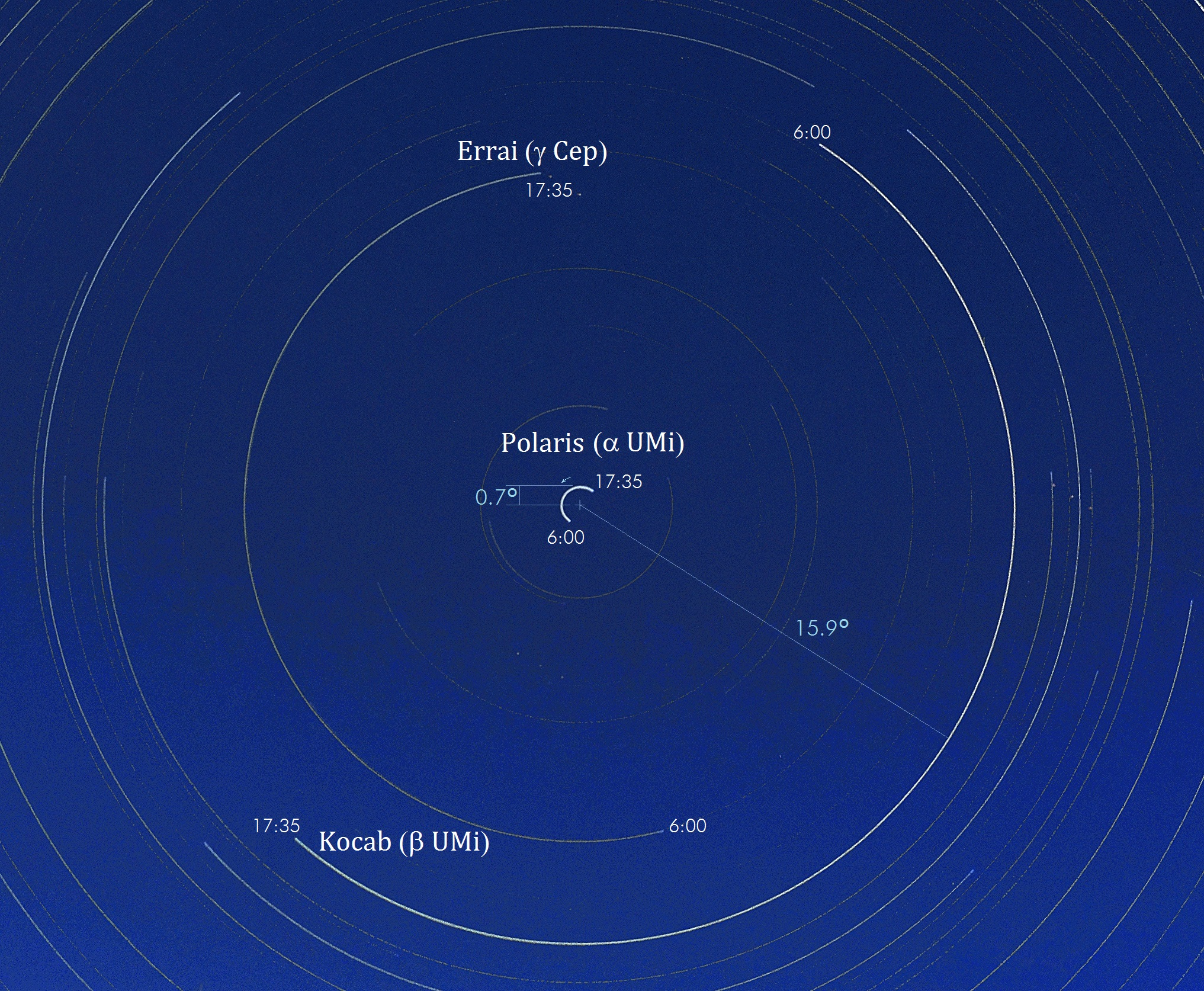 ポラリスと周辺の北天の星々の日周運動